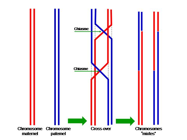 Description: Le processus de Crossing-over (Cycle cellulaire - méiose). Source: Dessin original. Auteur: Michel Hamels. Cette image est: librement diffusable à titre commercial ou non librement modifiable et l'image modifiée est elle-même librement modifiable et diffusable à titre commercial ou non. Michel Hamels 28 mars 2006 à 21:00 (CEST)